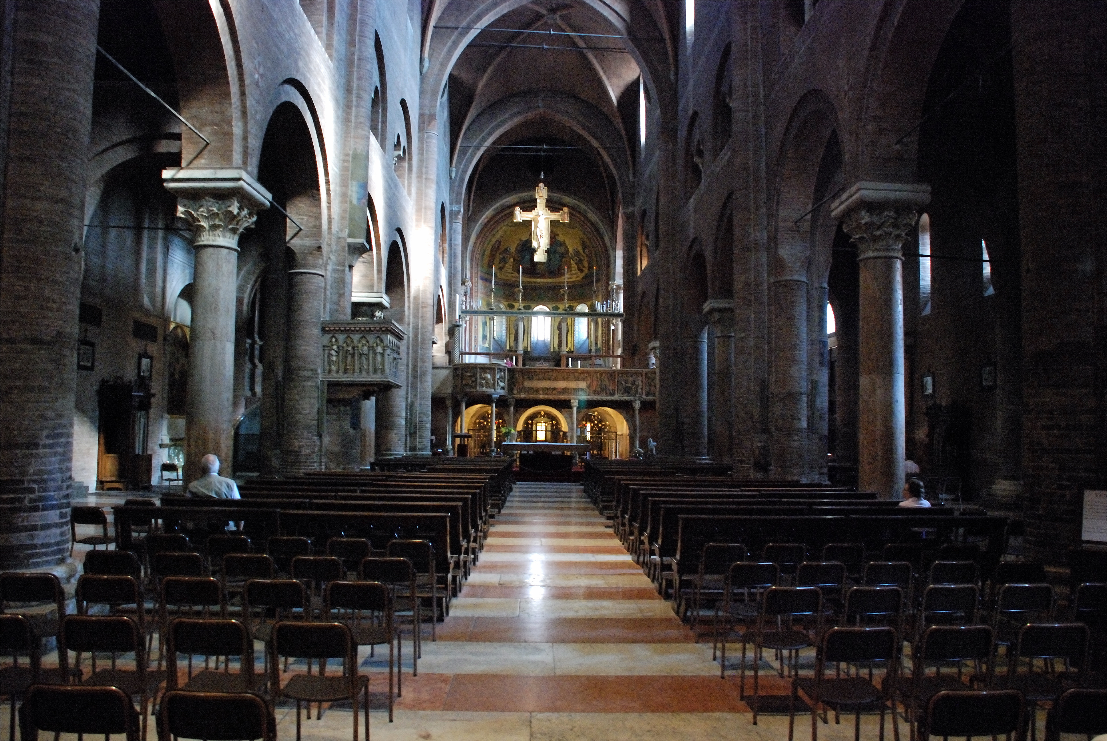 Interno del duomo di Modena